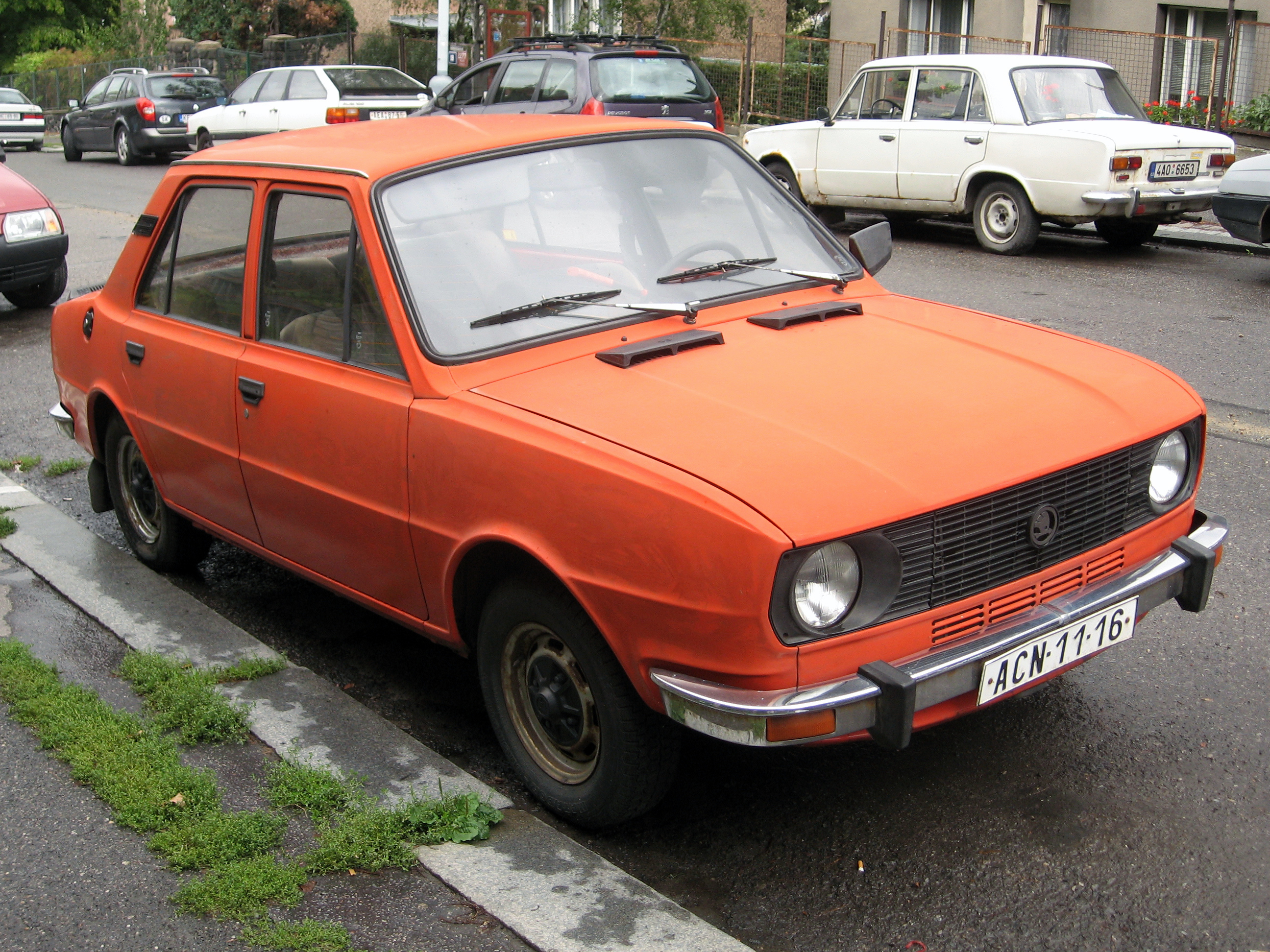 Škoda 105 back